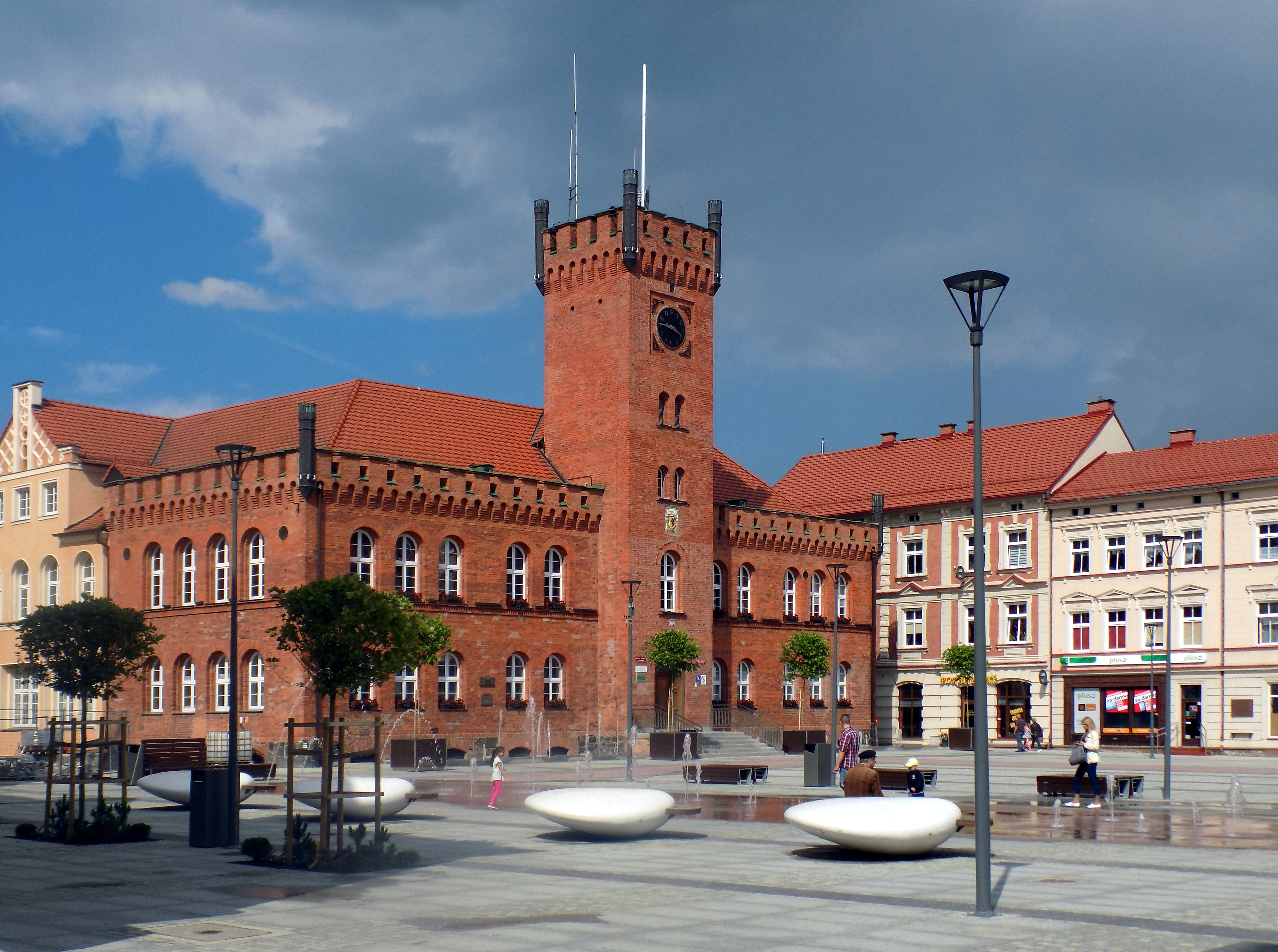 Szczecinek, Śródmieście miasta Wikidata has entry Q33329298 with data related to this item.